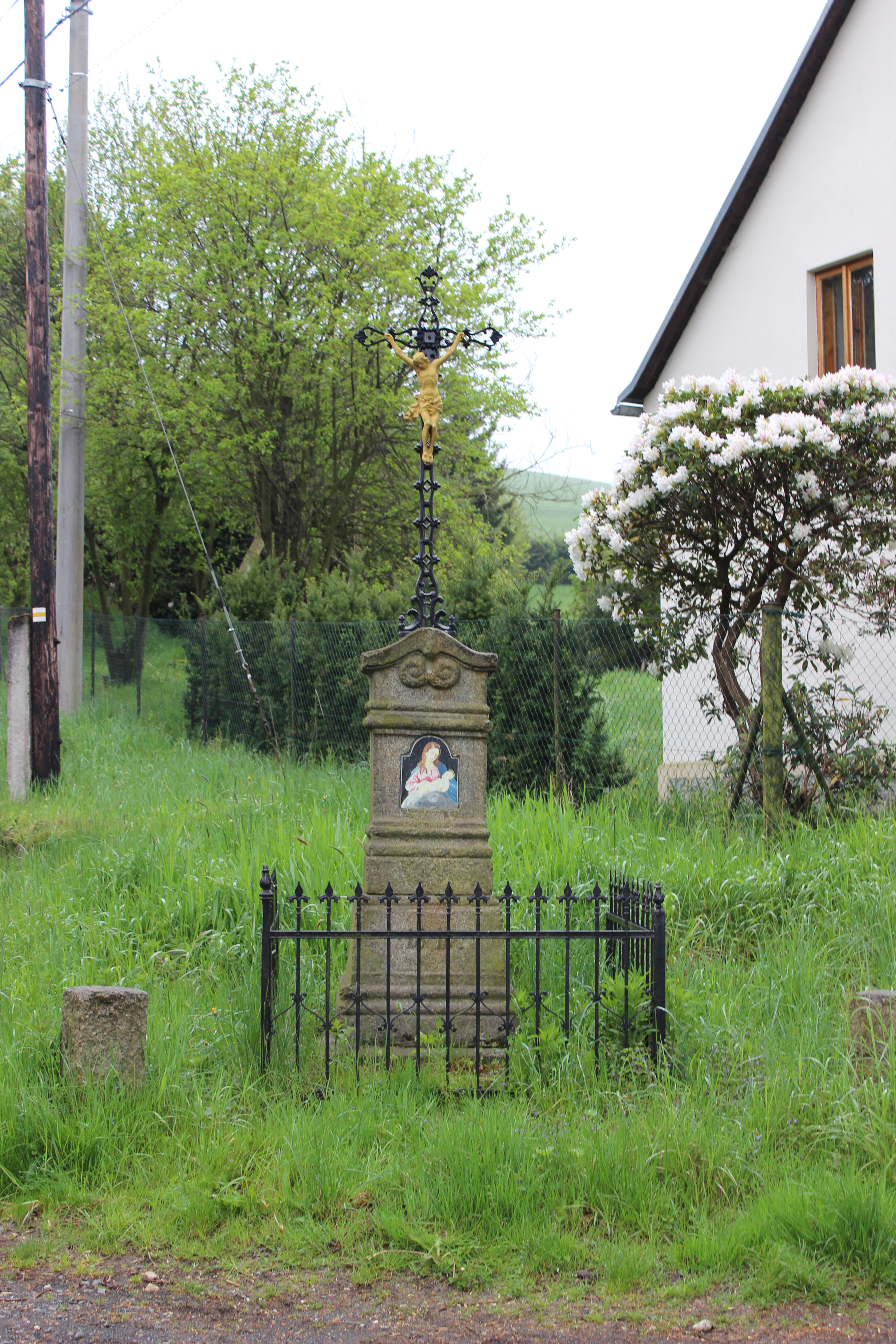 Dům číslo evidenční 34 v Pekle, části Raspenavy.